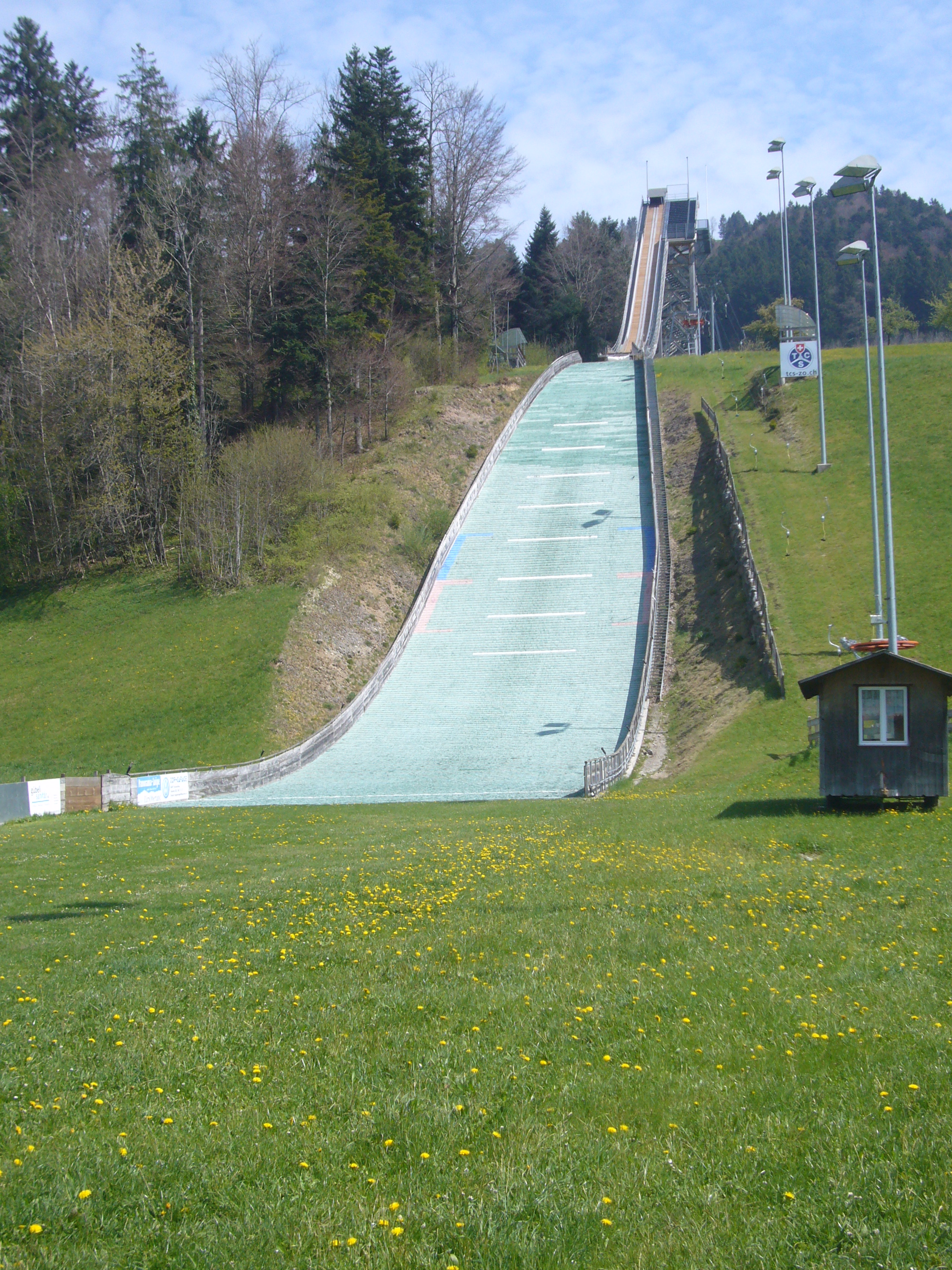 Die Sprungschanze Gibswil ersetzte eine ältere Anlage am Bachtel. Die grosse Schanze wird "Bachtelblick-Schanze" genannt.